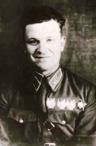 Фотография героя трех народов, летчика аса Матюнина Виктора Артемьевича